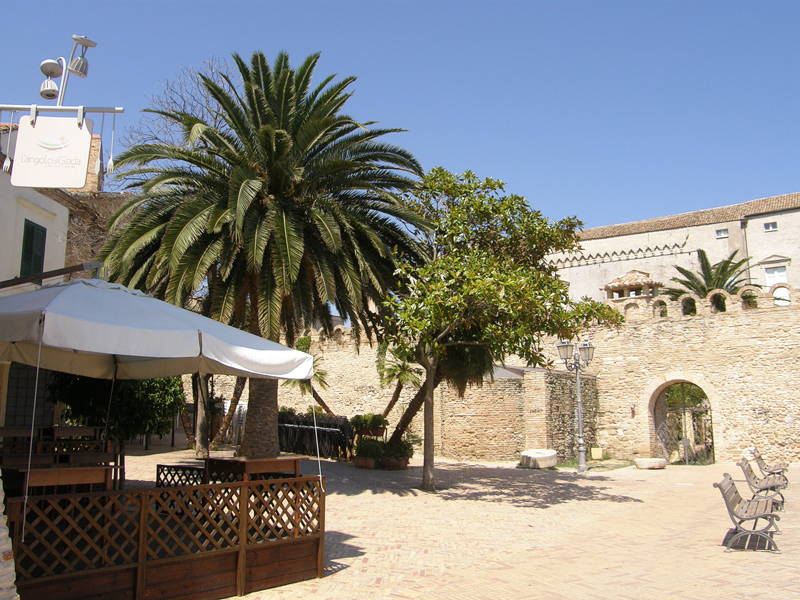 Vasto